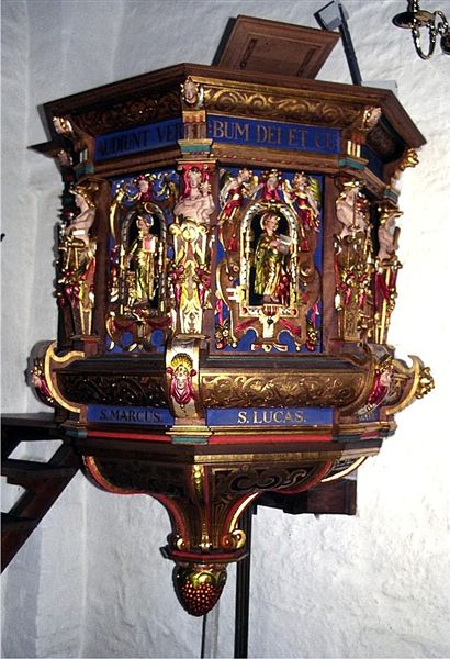 Roskilde Sankt Jørgensbjerg Kirke i Danmark. Prædikestol